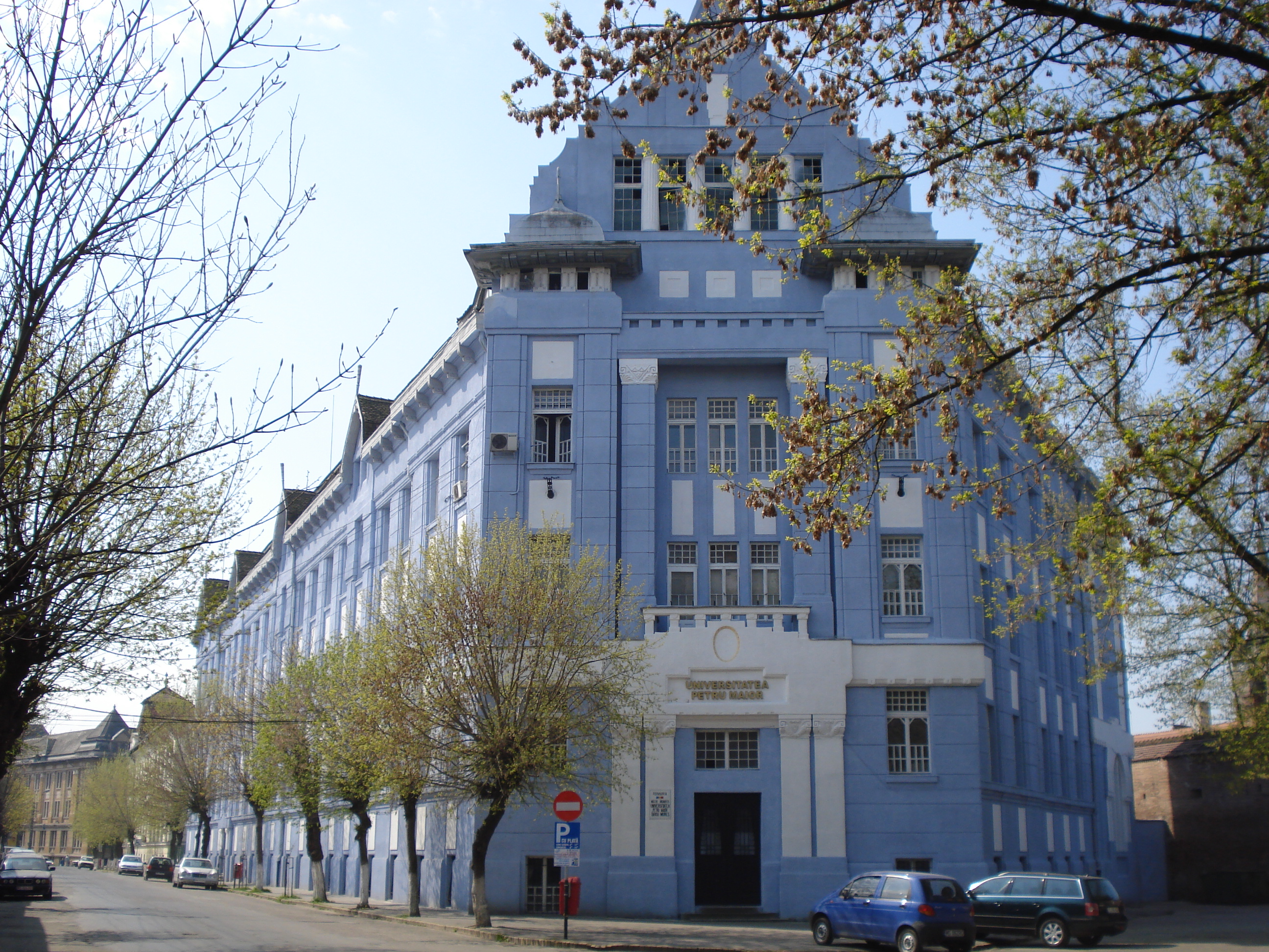 Petru Maior University, Târgu Mureş (Sándor Radó, 1908-12)